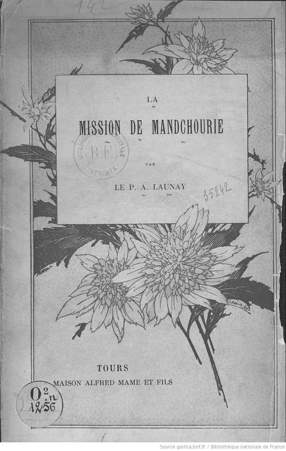 Couverture du livre du P. Adrien Launay M.EP., La Mission de Mandchourie, Tours, éd. Mame, 1905.